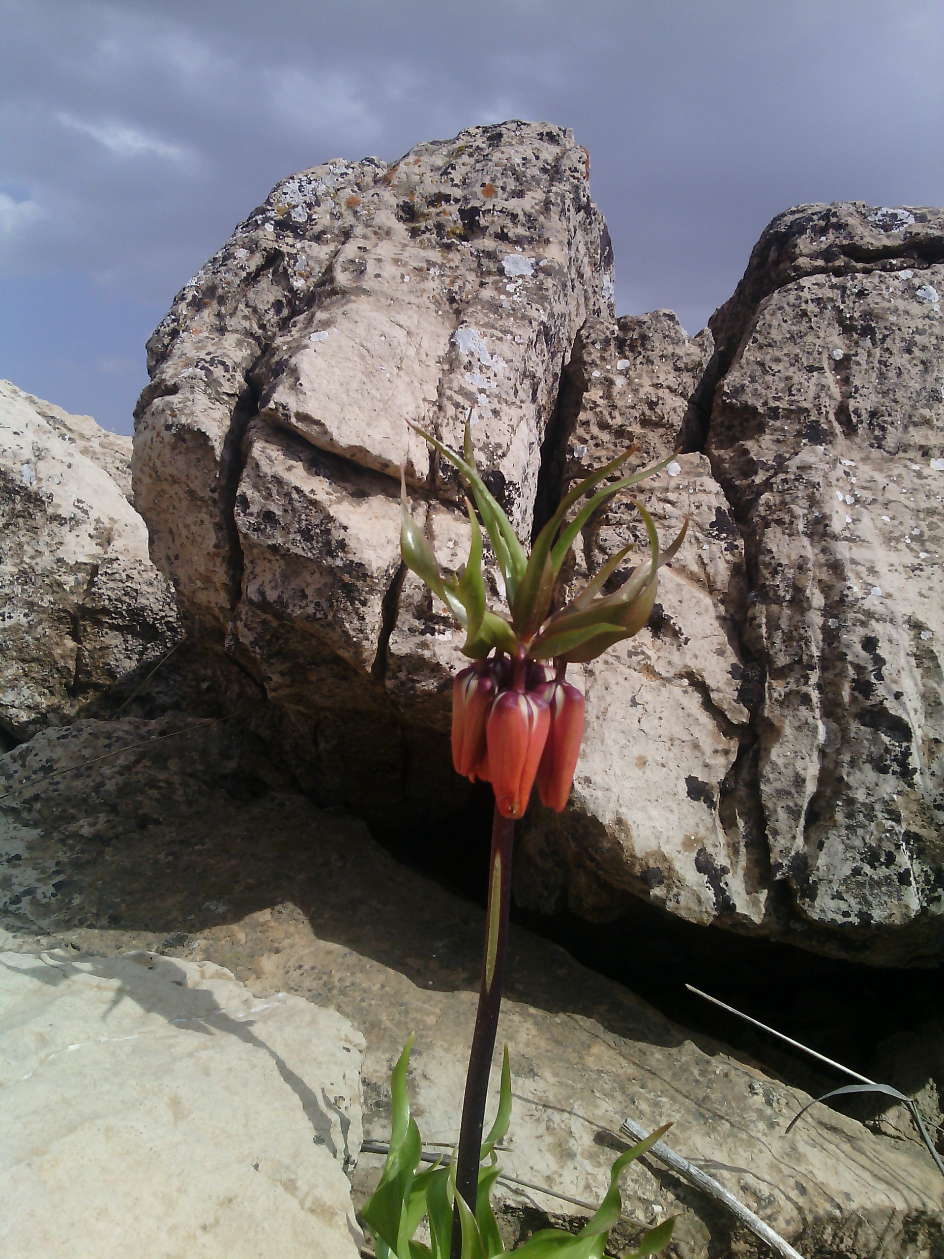 نمونه ای از پوشش گل های سرنگون گورشنگلی